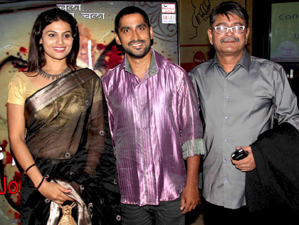 Sukhada Yash, Chinmay Mandlekar, Sunil Khosla at Marathi film 'Gajaar - Journey Of The Soul'